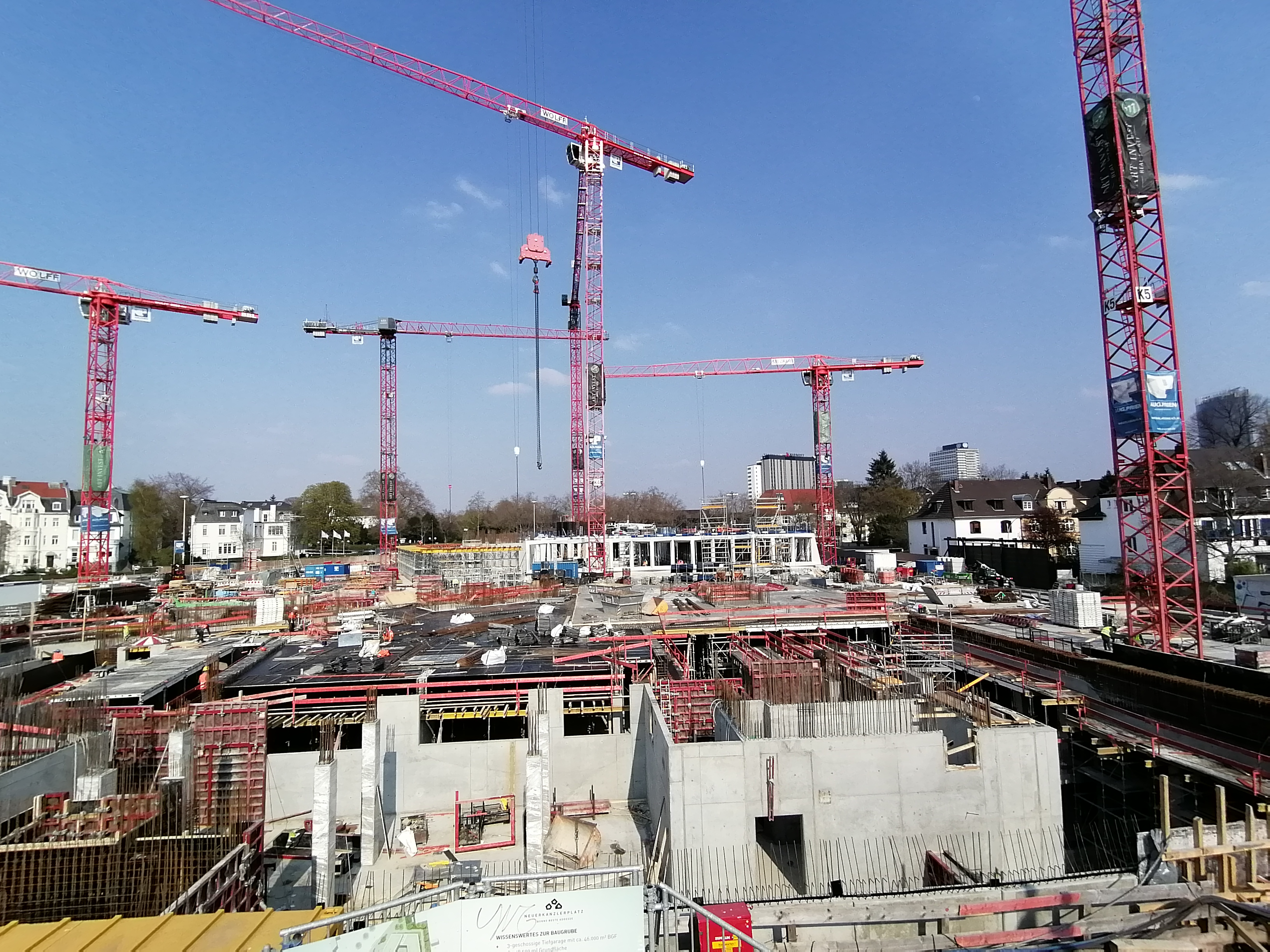 Der Baufortschritt des Neuen Stadtquartiers am Kanzlerplatz in Bonn am 2. April 2020. Die Bauarbeiten erreichen Straßenniveau.